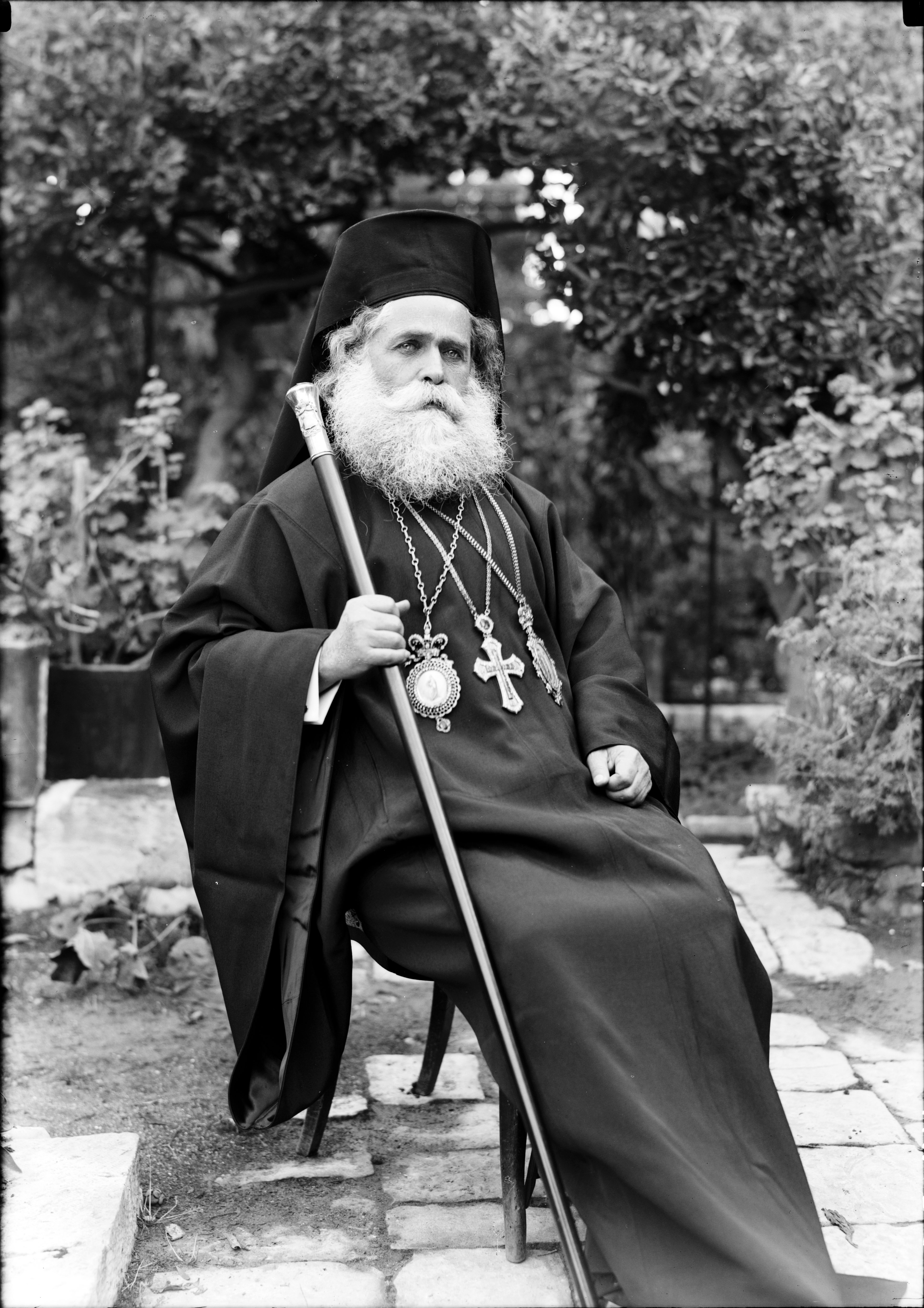 Патриарх Иерусалимский Тимофей. 1940-1946